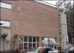 Una foto del frente del hospital de Wilde